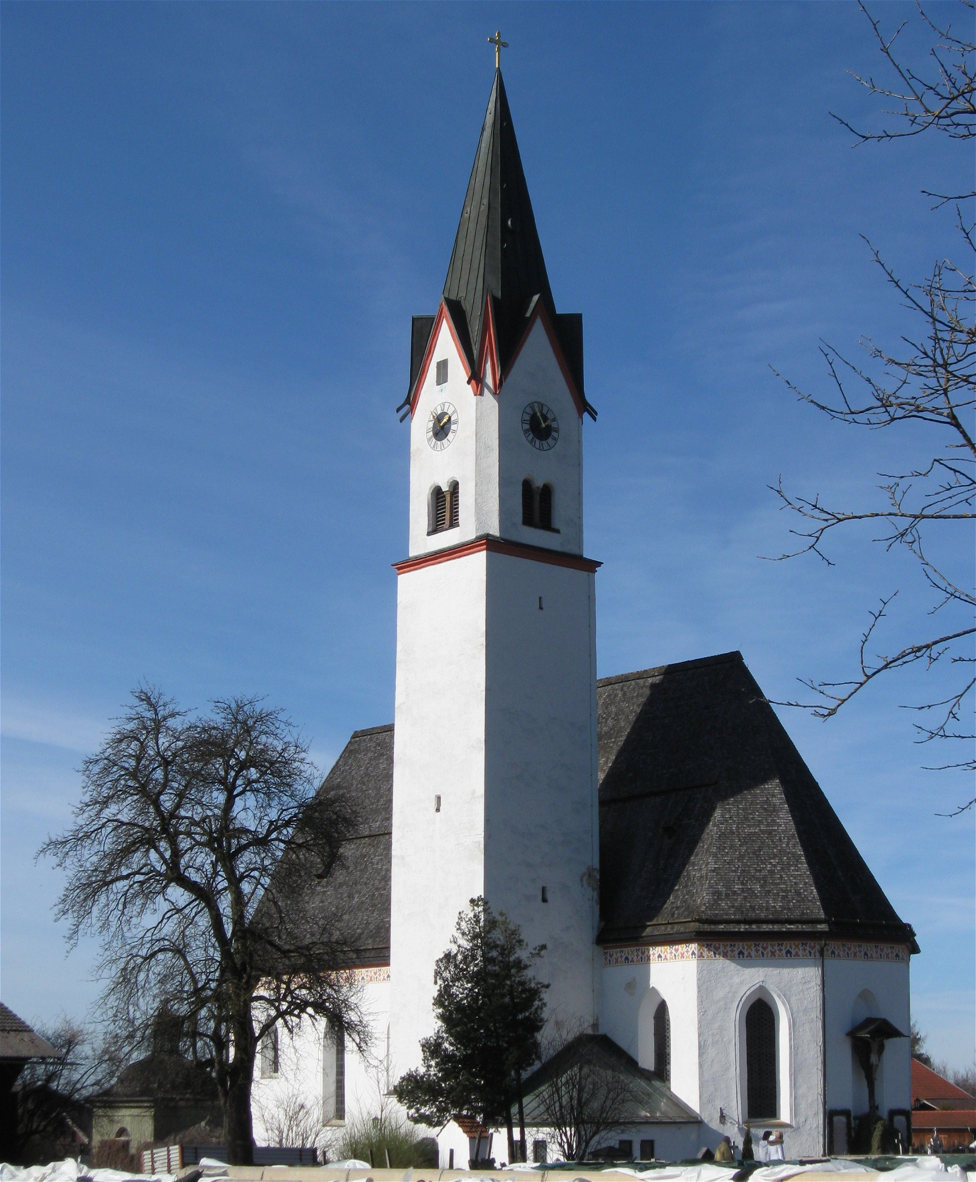 Kath. Filialkirche Hl. Dreifaltigkeit, Altenbeuern, Ende 15. Jh. erbaut, barocke Umgestaltung 1650/55 und im 18. Jh.